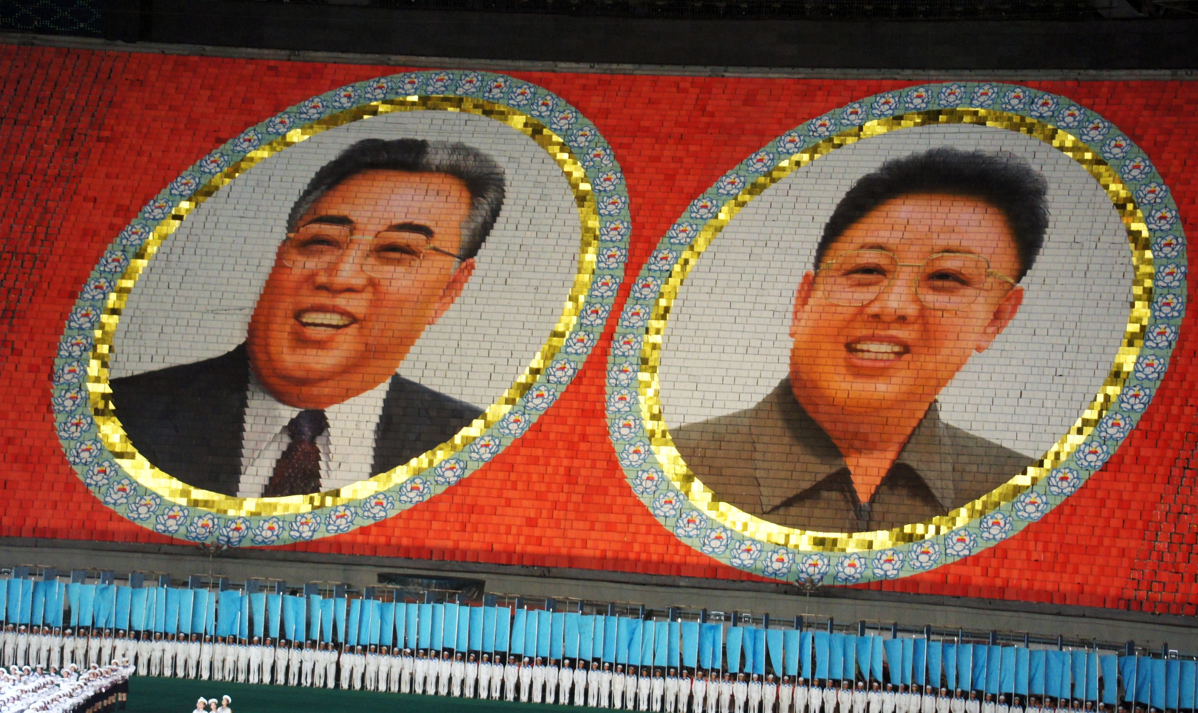 La Gimnasia de las Grandes Masas y Actuación Artística Arirang o simplemente Festival Arirang (chosŏn'gŭl: 아리랑 축제, hancha: 아리랑 祝祭, romanización revisada: Arirang Chukje, McCune-Reischauer: Arirang Ch'ukche)?, es un festival que se lleva a cabo en el Estadio Reungrado Primero de Mayo en Pionyang, Corea del Norte.